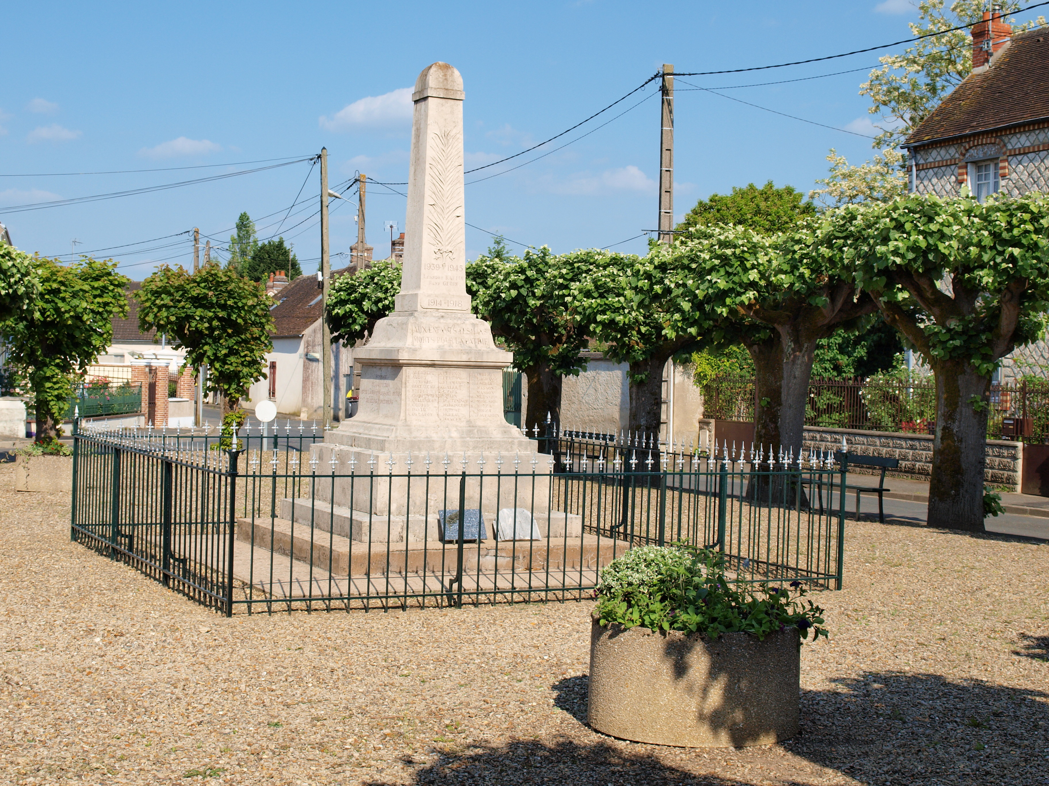 Monuments aux morts d'Esmans (Seine et Marne, France)